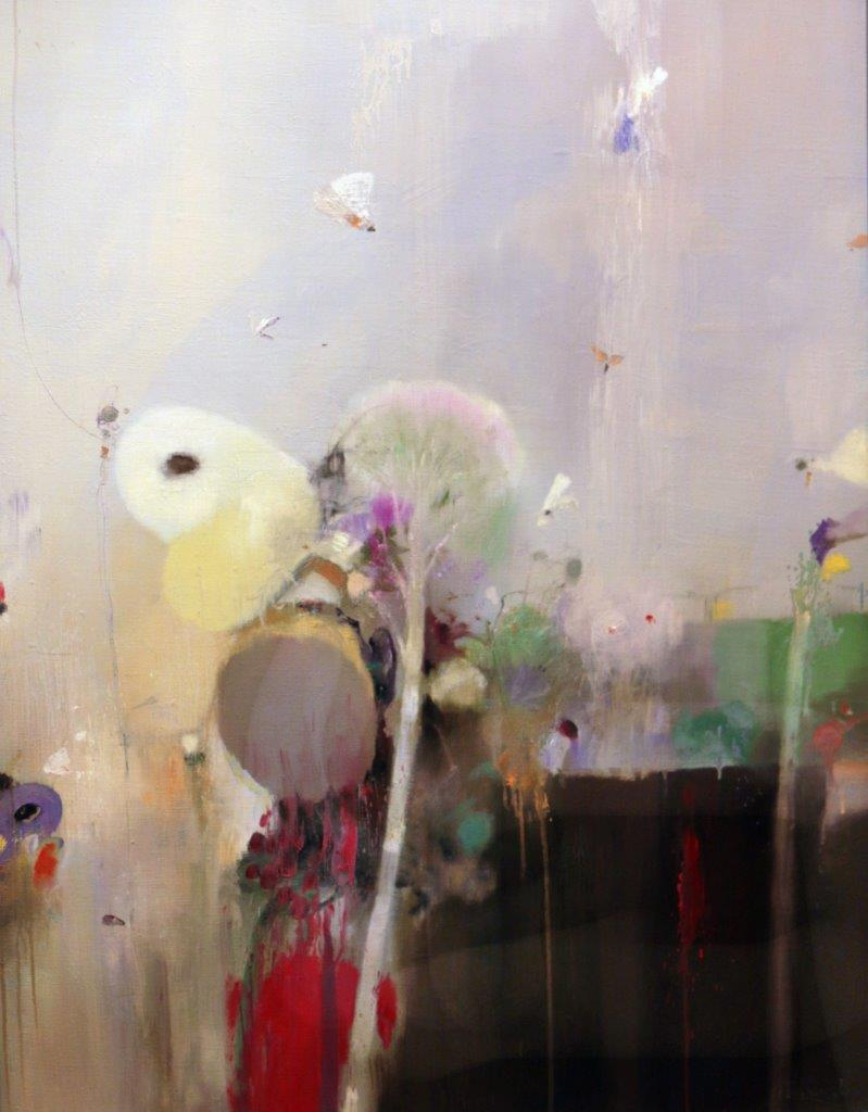 Willy Reichert, Stilrichtung Stillleben